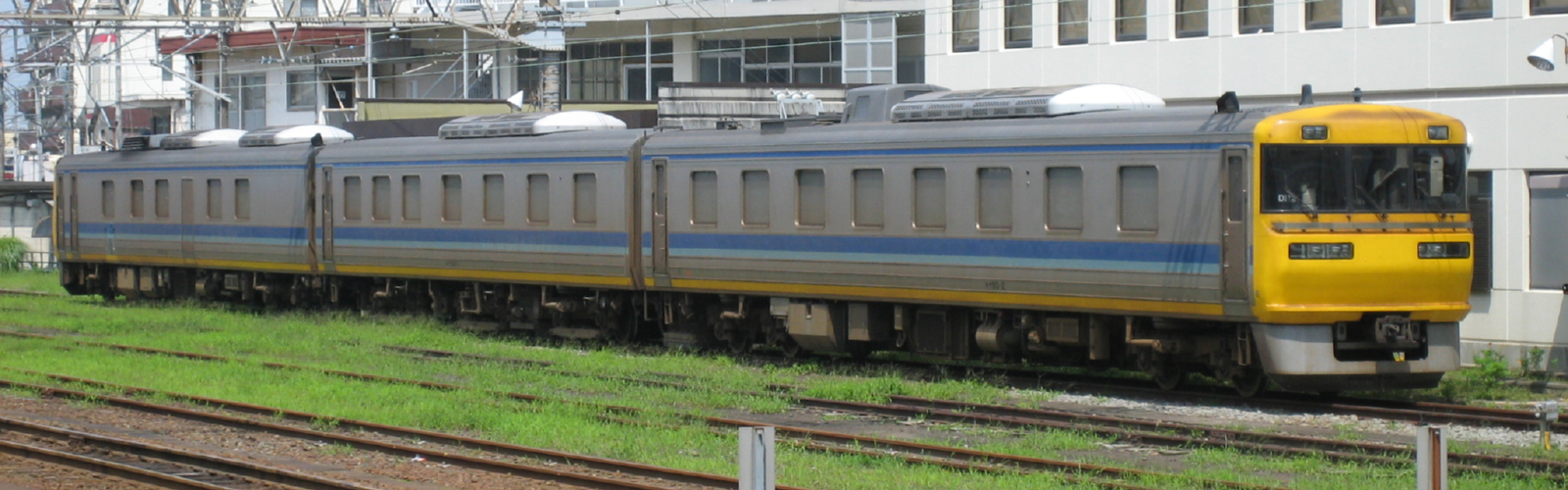 JR東海キヤ95系気動車